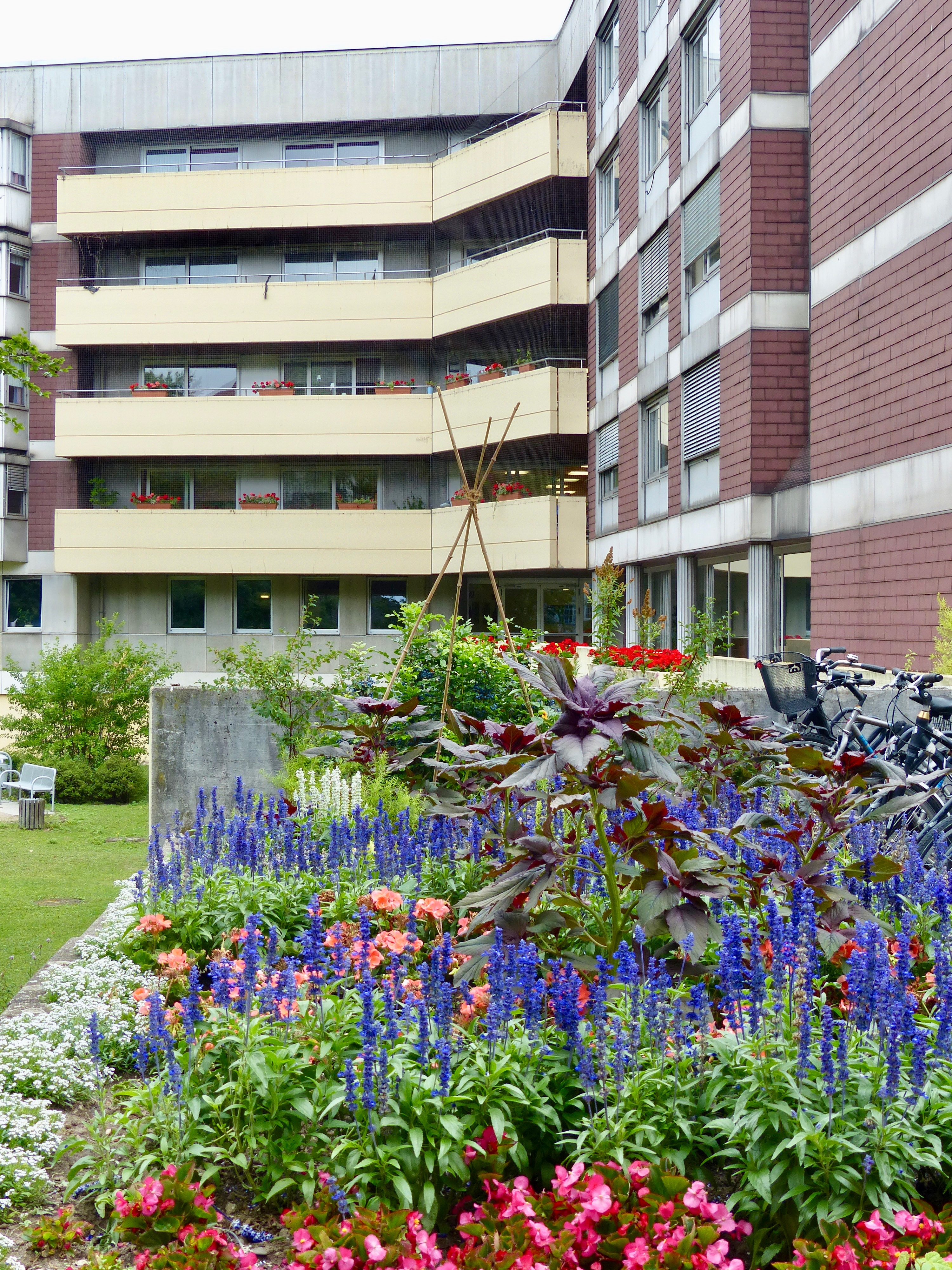 Riehler Heimstätten (2017): Haus 8